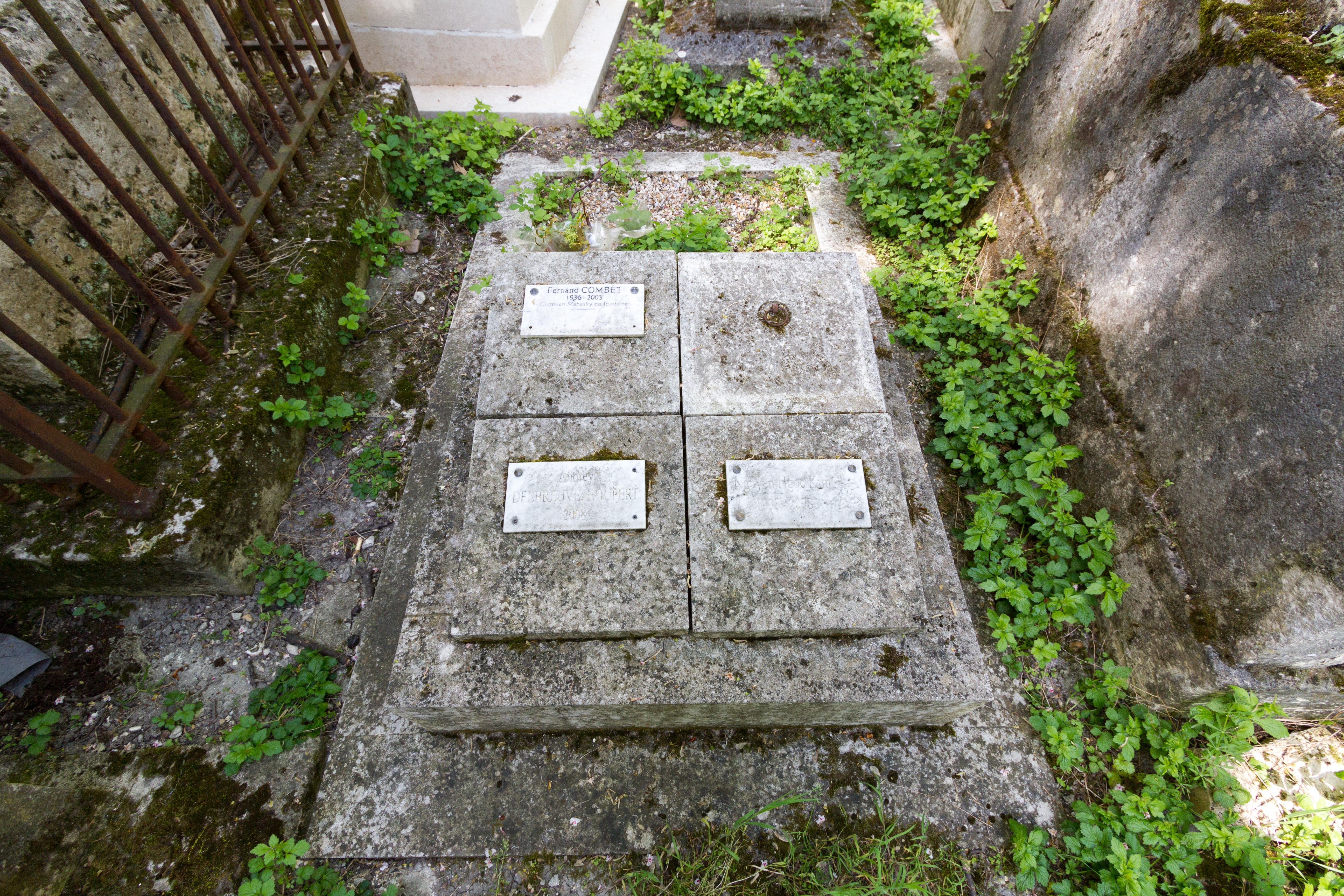 Sépulture de Fernand Combet (1936-2003), romancier, auteur de quatre livres en vingt ans : SchrummSchrumm ou L’excursion dominicale aux sables mouvants (1966), Factice ou les hommes-oiseaux (1968), Vie et mort de Félix C. Scribator (1971), Contes d'ambre et d'opium (1985).